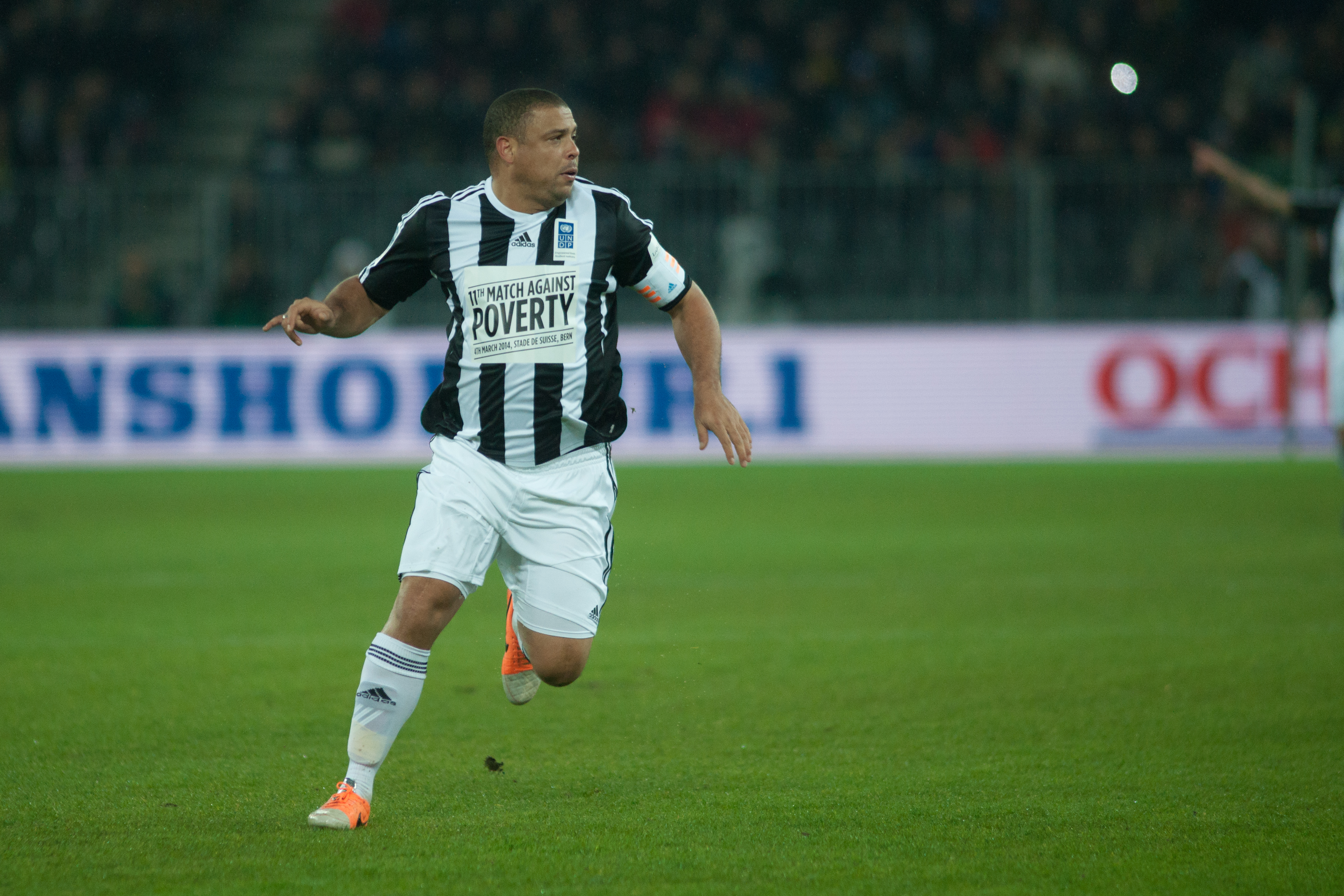 Football against poverty 2014 - Ronaldo